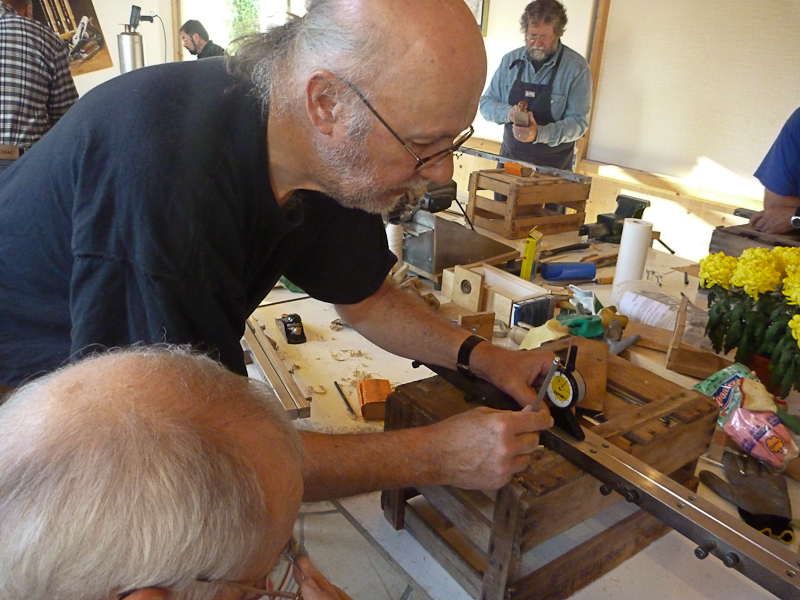 Das Einstellen der Hobelform mit einer Einstelluhr